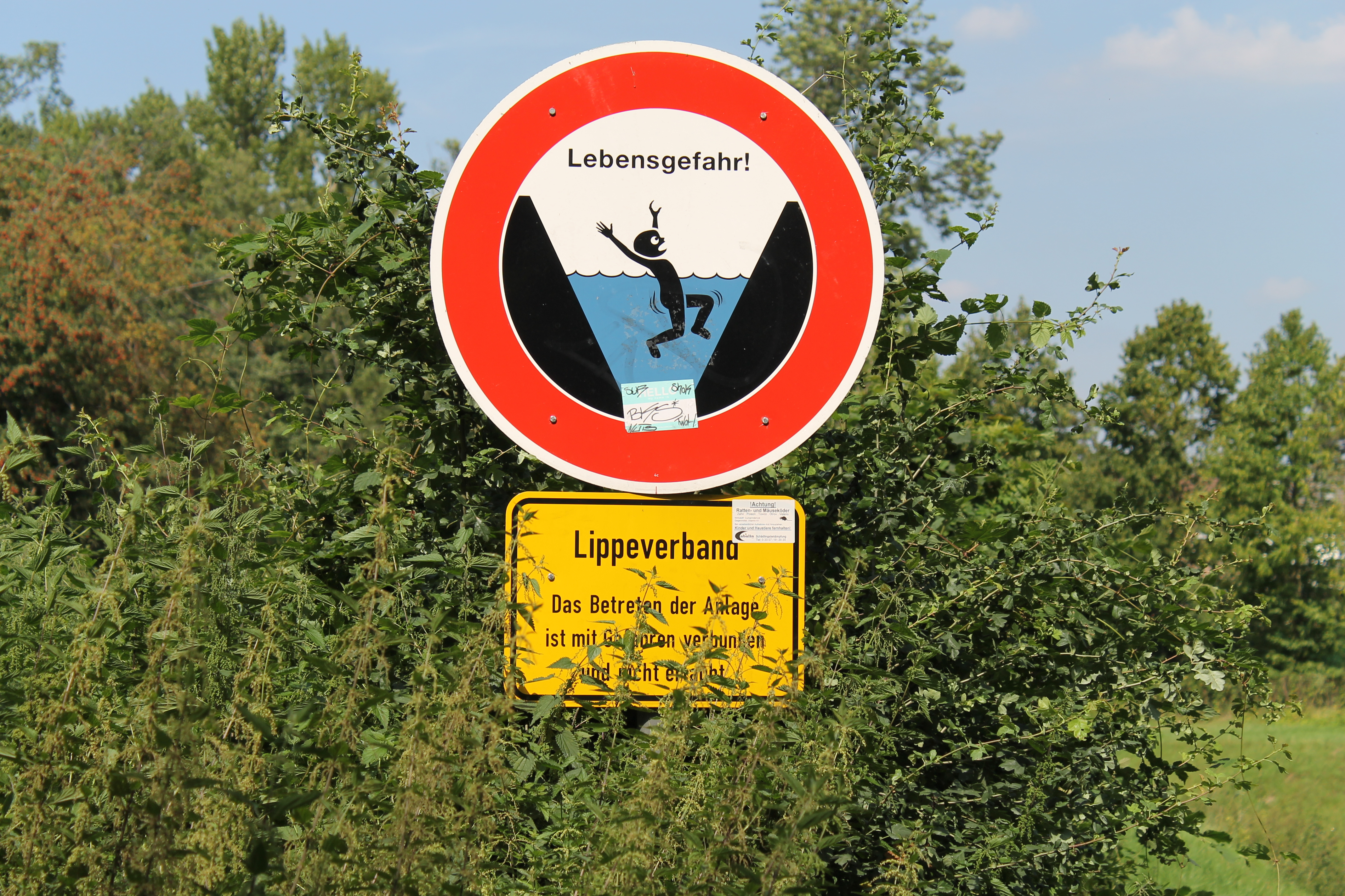 Ein typisches Schild an der Emscher.